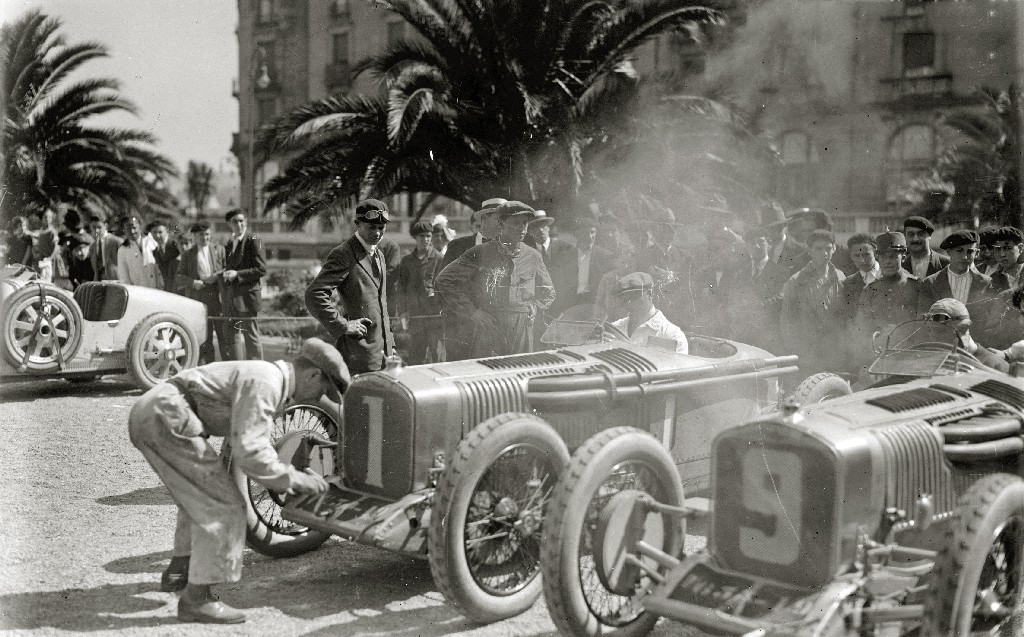 Título original: III Gran Premio Automóvilistico de San Sebastián (3/4) Localización: San Sebastián (Guipúzcoa)